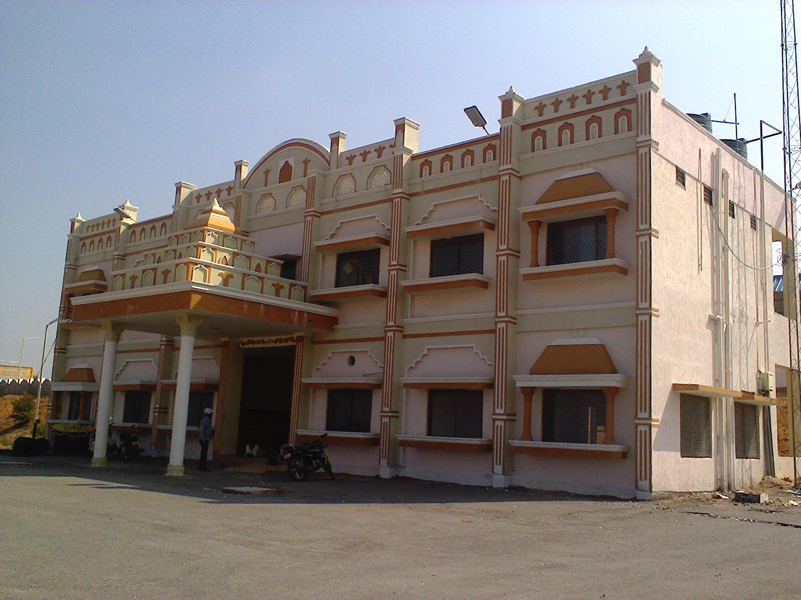 పాం. ర. స్వా. రై. స్టే. భవనం